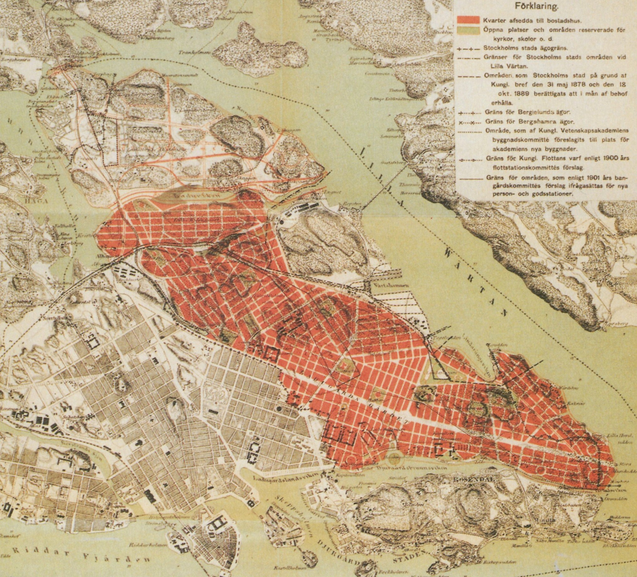 Utkast till stadsplan öfver Norra Djurgården (utsnitt)